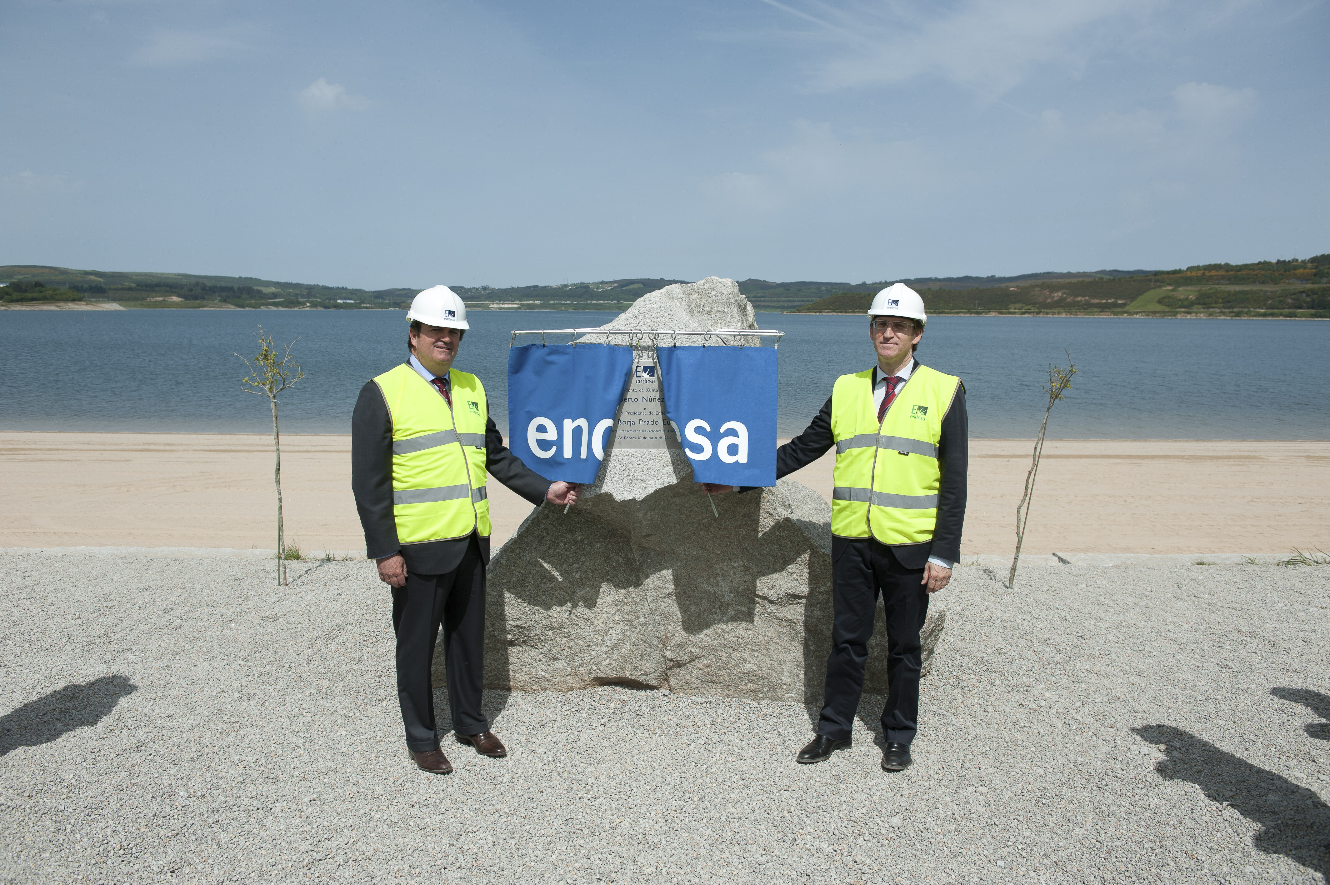 El presidente de Endesa en el acto de inauguración del lago de As Pontes